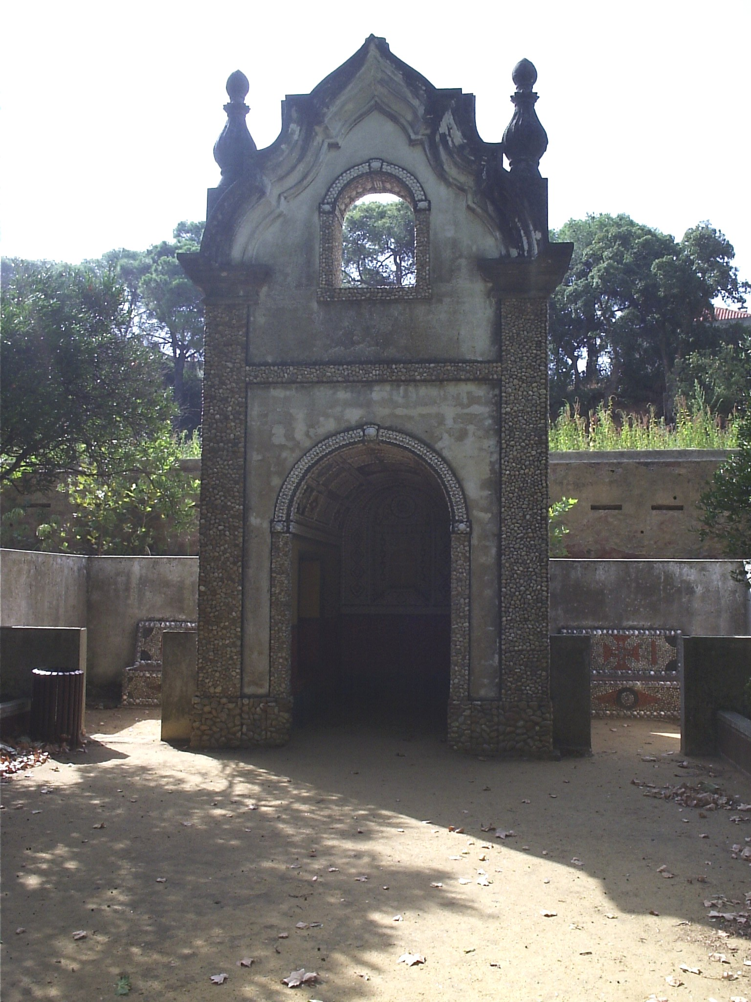 Pequena capela nos jardins da Quinta da Fidalga, Seixal - Portugal.